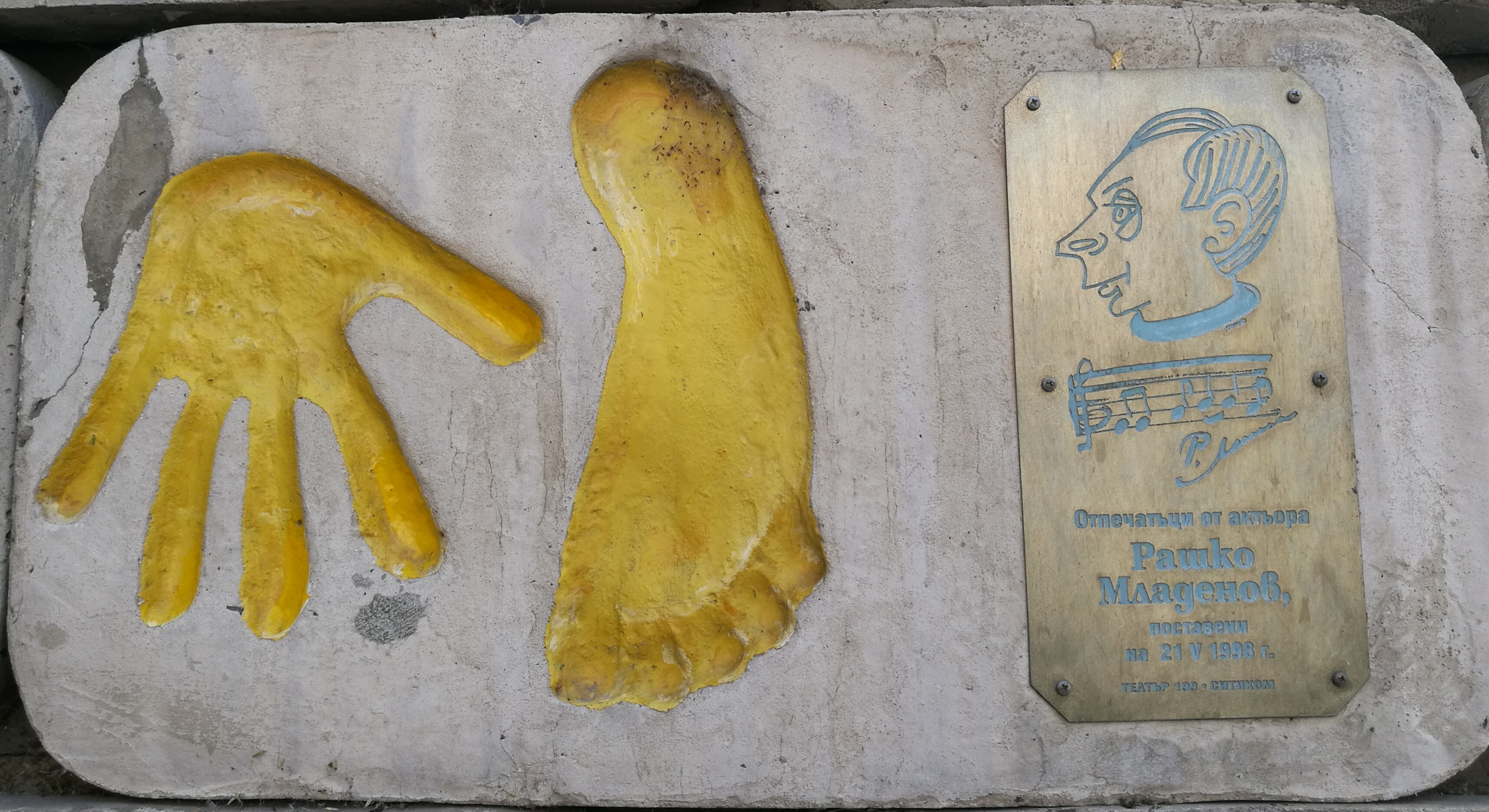 Стената на славата пред Театър 199 - пано с отпечатъци, послание и шарж на Рашко Младенов.